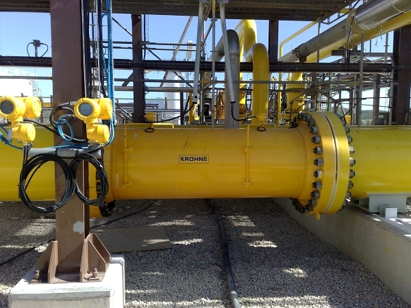 Измерение расхода природного газа в газохранилище